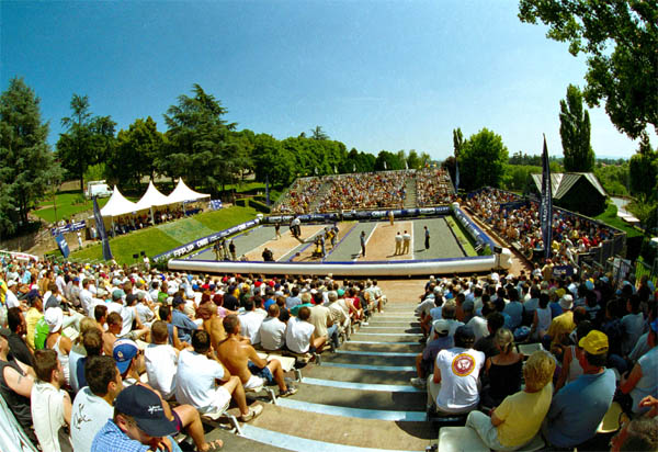 Quarterback DR